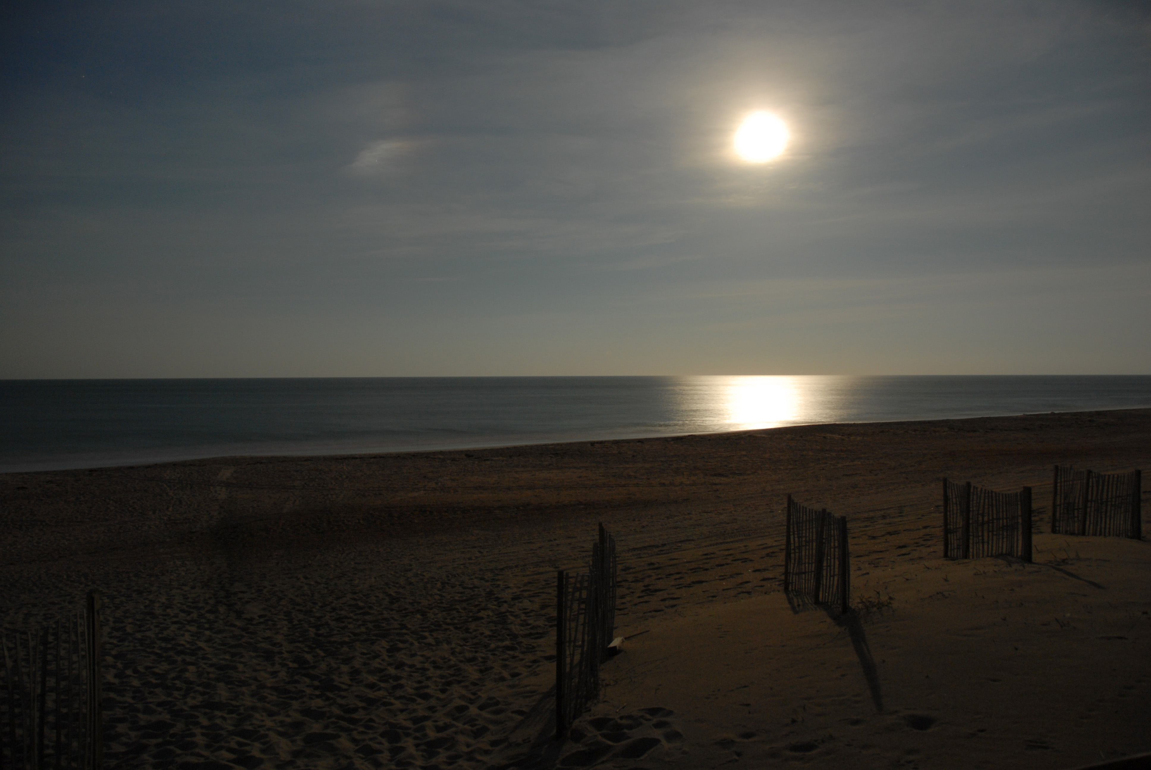 Outer Banks Outer Banks im September 2008 bei Mondschein